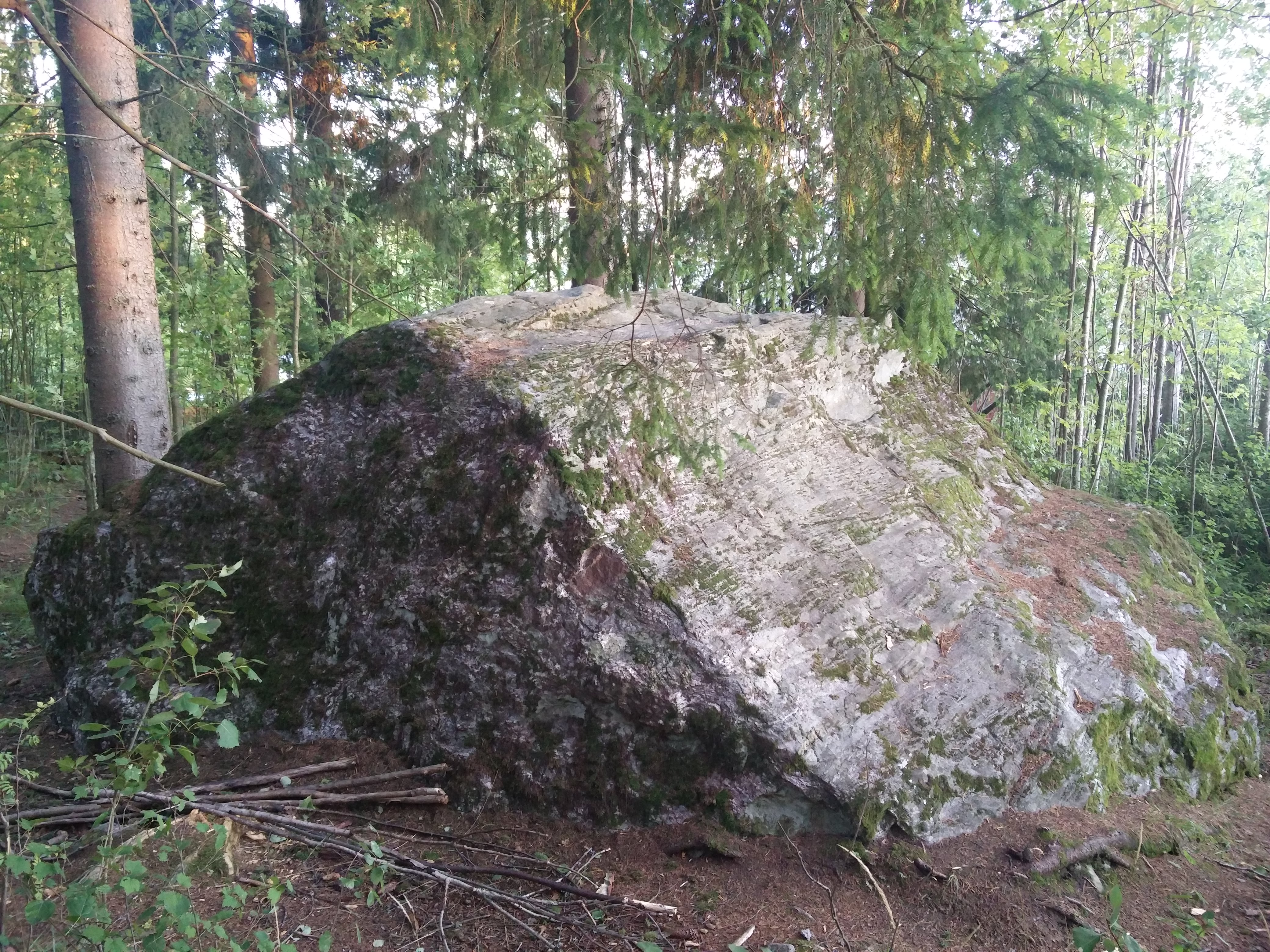 Kuppikivi Herrasmanni, Lahti